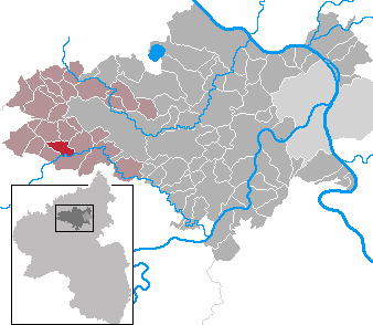 Gemeinde Anschau im Landkreis Mayen-Koblenz